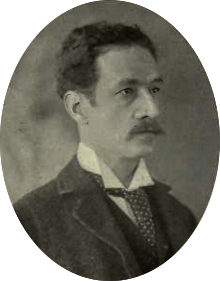 Louis Wain Photo: Lascelles & Co.